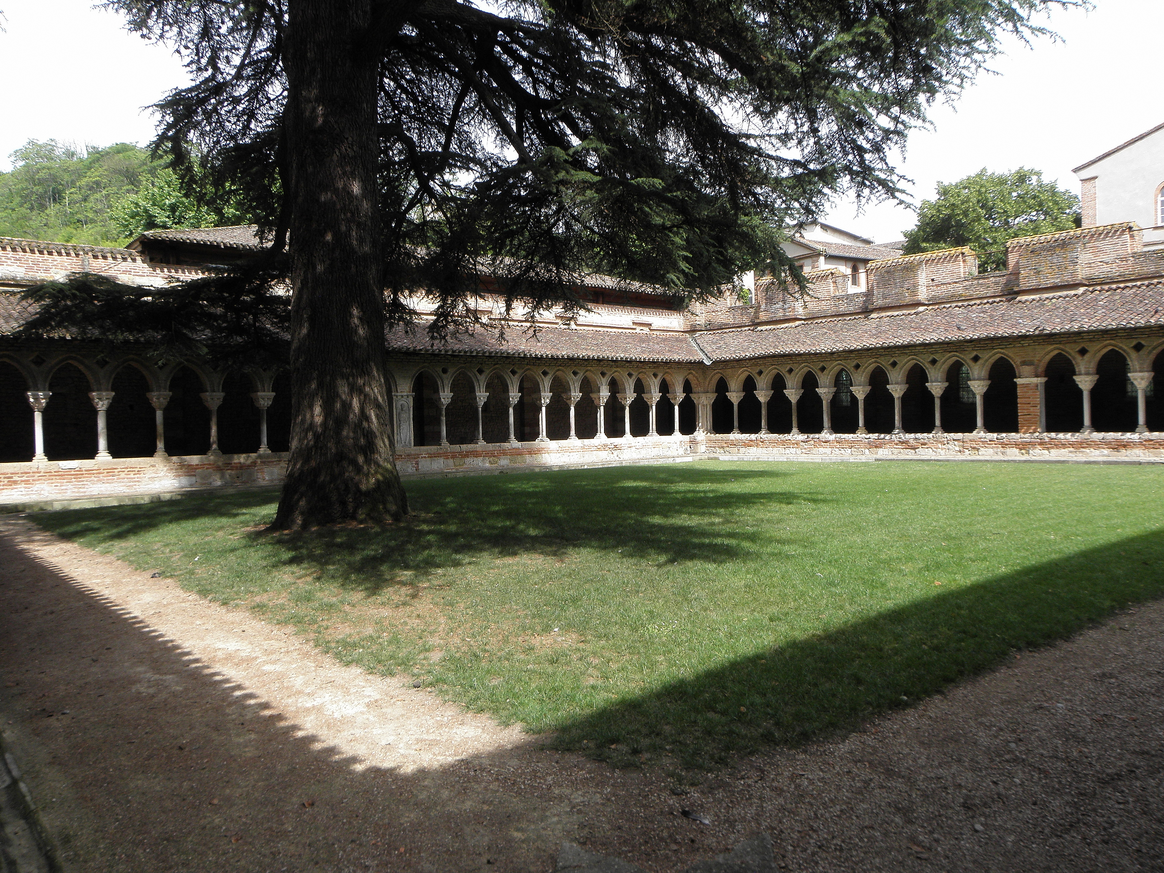 Cloître de l'abbaye Saint-Pierre de Moissac (82). .